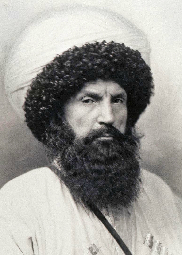 Фотопортрет имама Шамиля